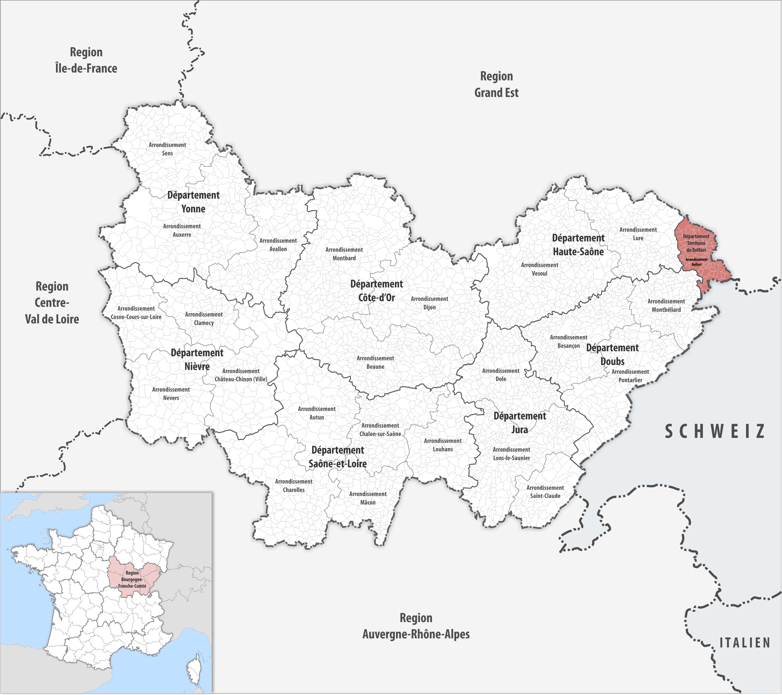 Lage des Arrondissements Belfort